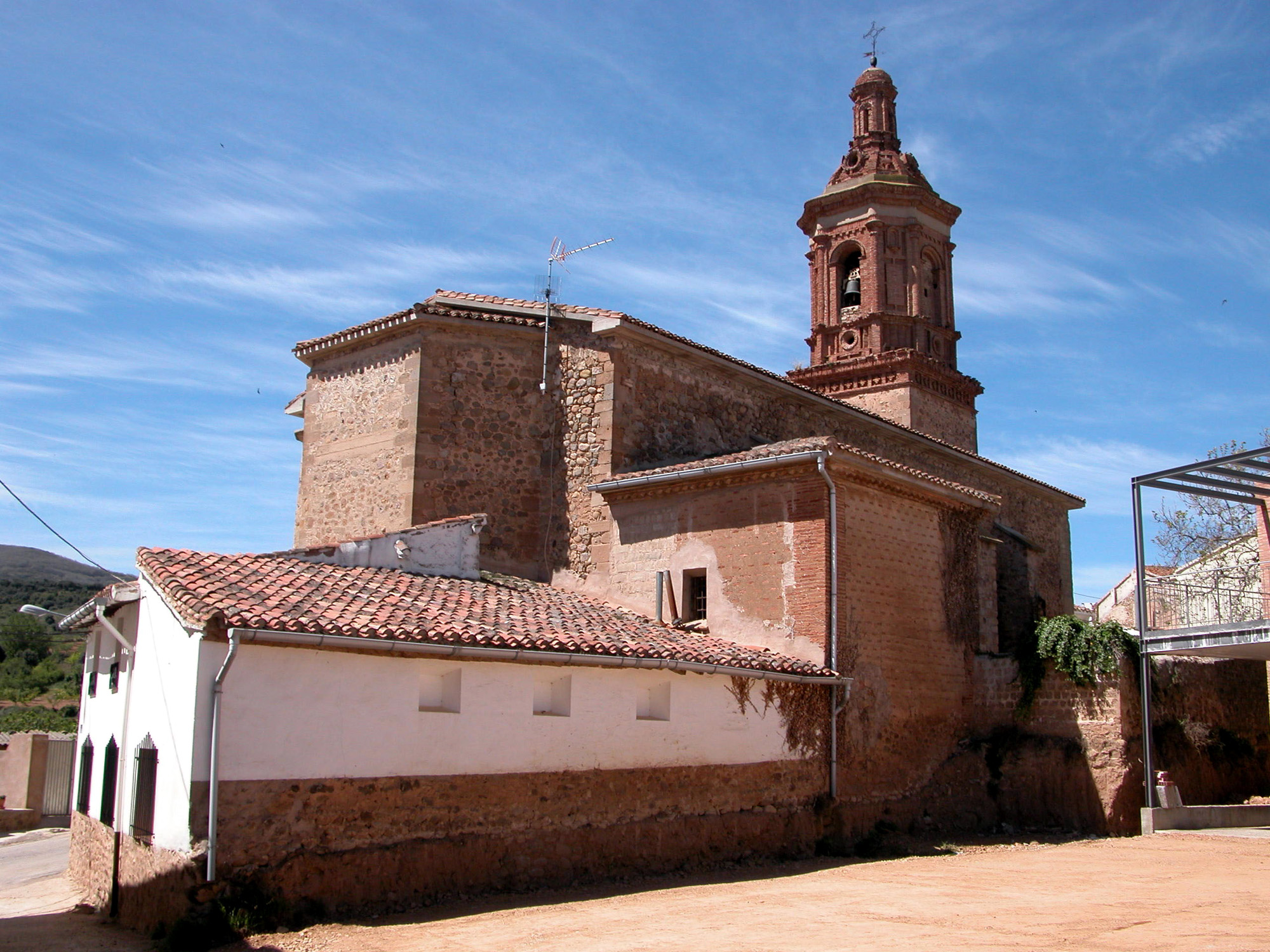 Iglesia de Santa Catalina en Pipaona, aldea de Ocón (La Rioja - España)